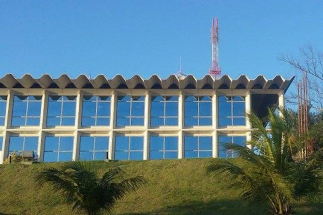 Sede da InterTV Alto Litoral, em Cabo Frio, Rio de Janeiro, Brasil.